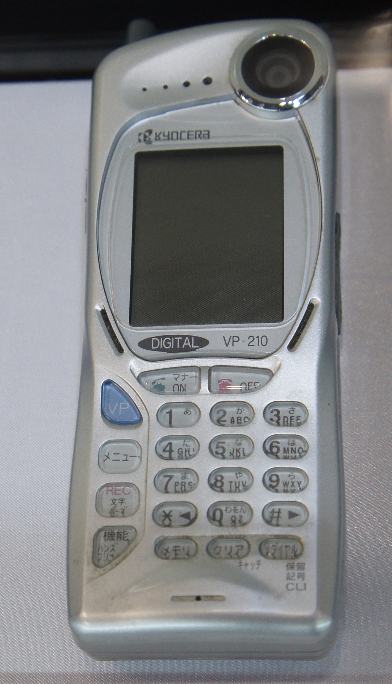 CP+ 2011: 1999 Kyocera VP-210